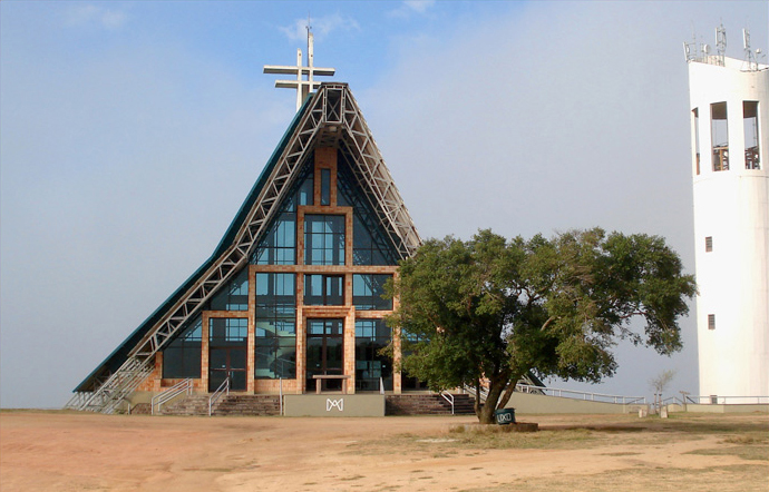 Santuário Mãe de Deus, Morro da Glória, Porto Alegre, Brasil.